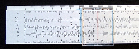 En räknesticka